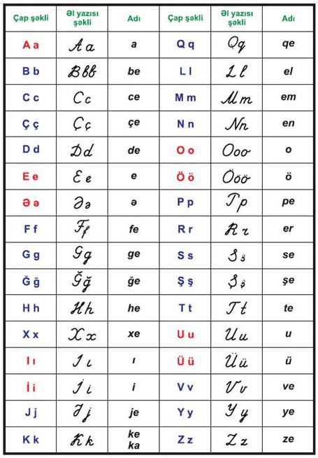 Azərbaycan əlifbası